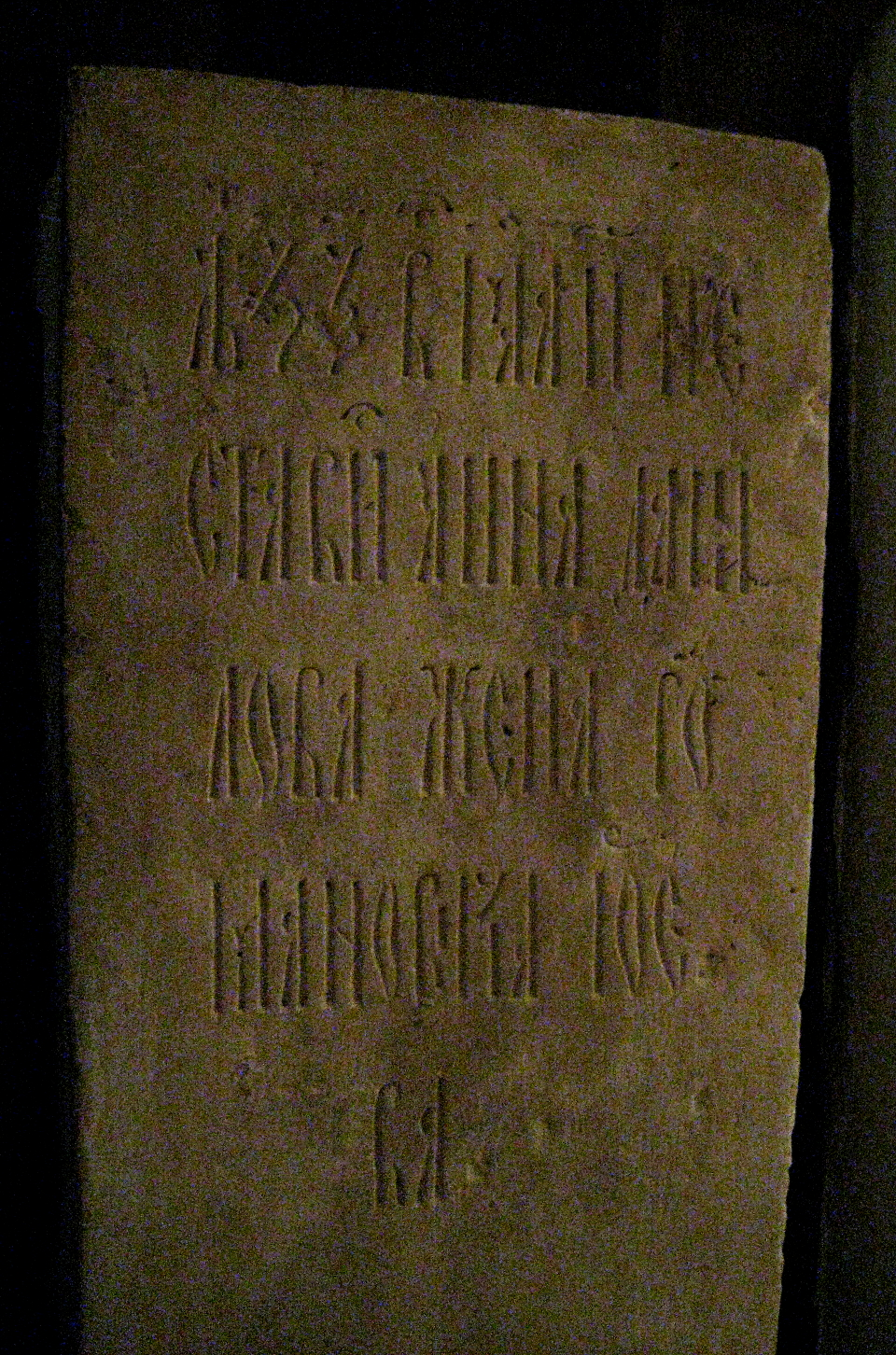 Новоспасский монастырь. Усыпальница Романовых Надпись на ближней могиле: "Лета 7062 мая 8 преставися княгиня Анна Данилова жена Романовича" (жена Даниила, сына Романа Юрьевича Захарова)